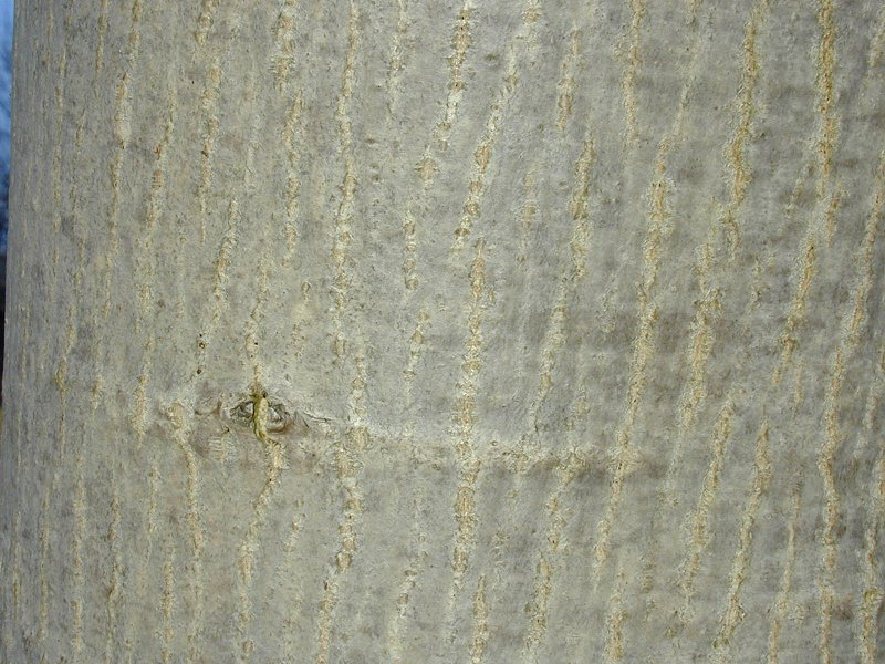 Walnut (Juglans regia) bark